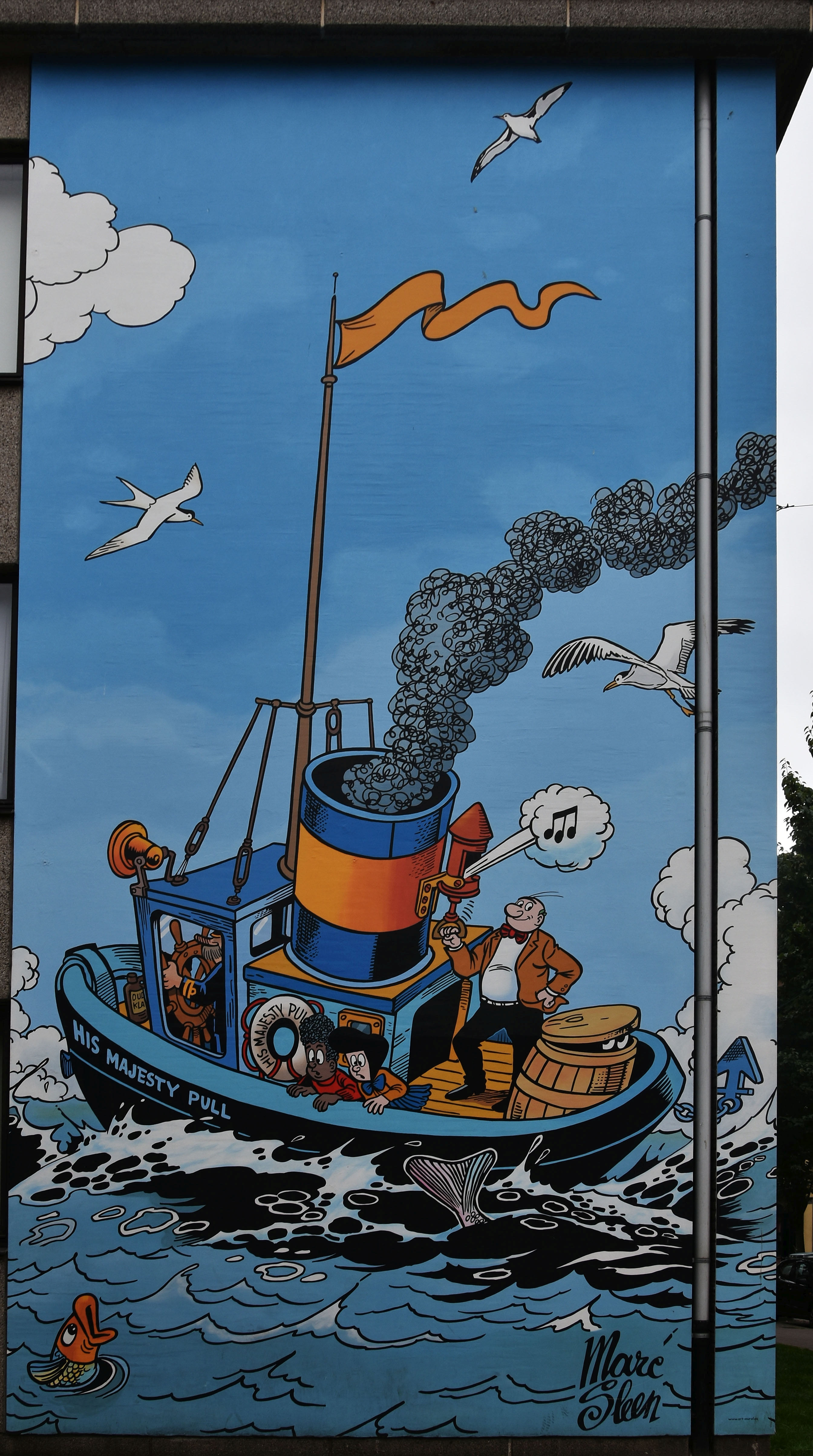 Muurschildering Marc Sleen Antwerpen 19-08-2018 This photo of immovable heritage has been taken in the Flemish Region